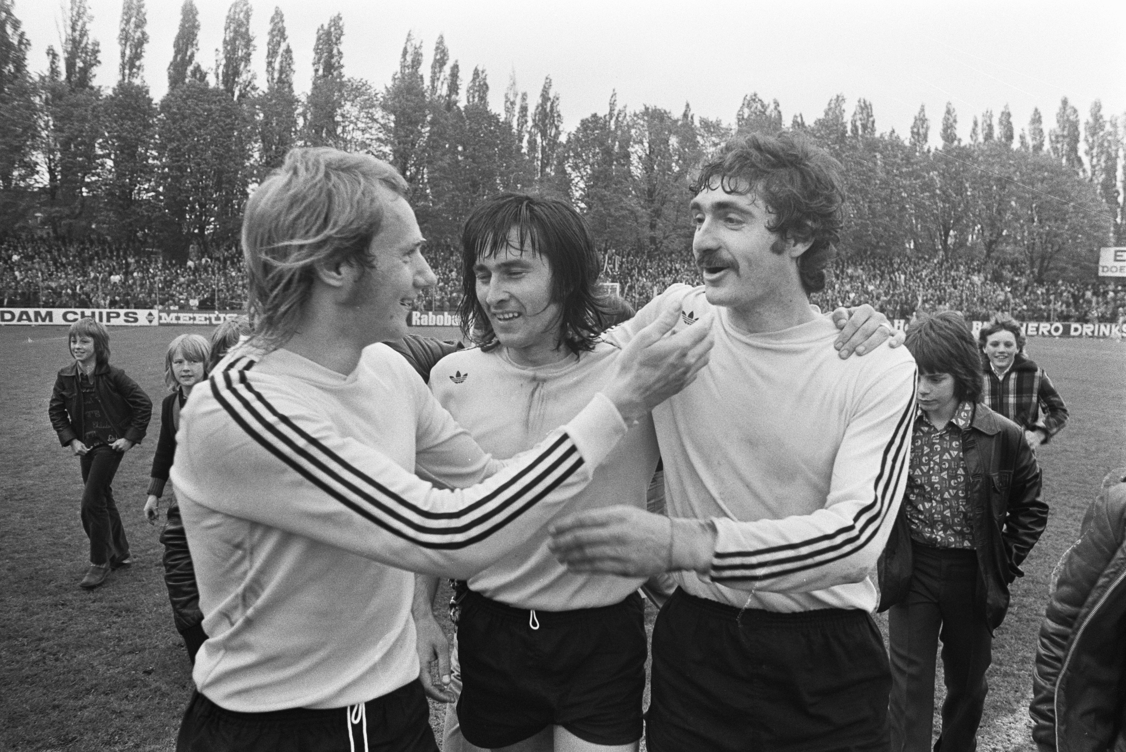 Collectie / Archief : Fotocollectie Anefo Reportage / Serie : NAC-Haarlem 3-1 (degradatie Haarlem) Beschrijving : In het midden Mujkic (NAC) omgeven door ploeggenoten na zijn doelpunt Datum : 11 mei 1975 Locatie : Breda, Noord-Brabant Trefwoorden : spelers, sport, voetbal, wedstrijden Persoonsnaam : Mujkic, Fikret Fotograaf : Rob Croes / Anefo Auteursrechthebbende : Nationaal Archief Materiaalsoort : Negatief (zwart/wit) Nummer archiefinventaris : bekijk toegang 2.24.01.05 Bestanddeelnummer : 927-9192